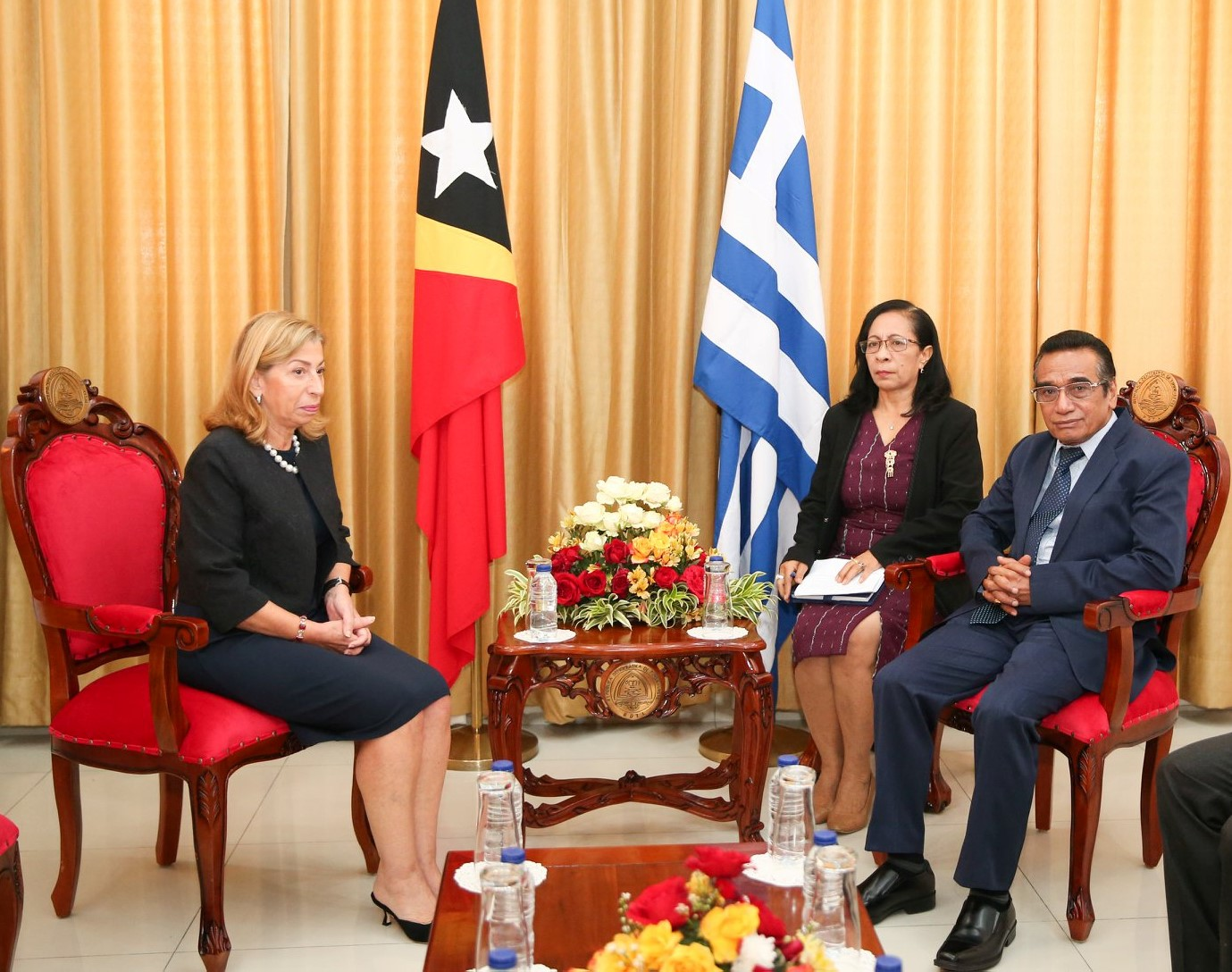 Konstantina Koliou übergibt ihre Akkreditierung als Botschafterin Griechenlands an Osttimors Staatspräsident Francisco Guterres.